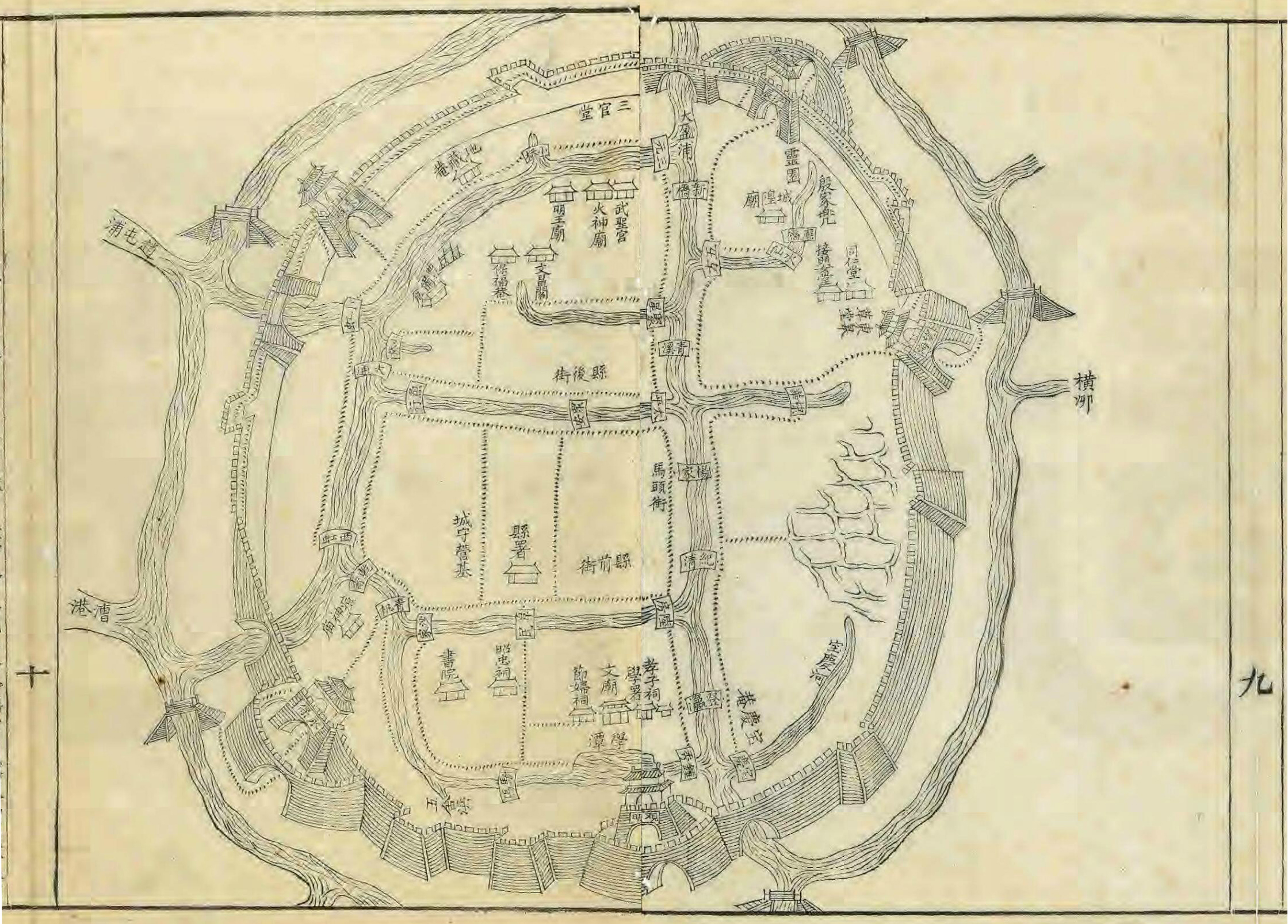 清光绪五年（1879）《青浦县志》青浦县治图。